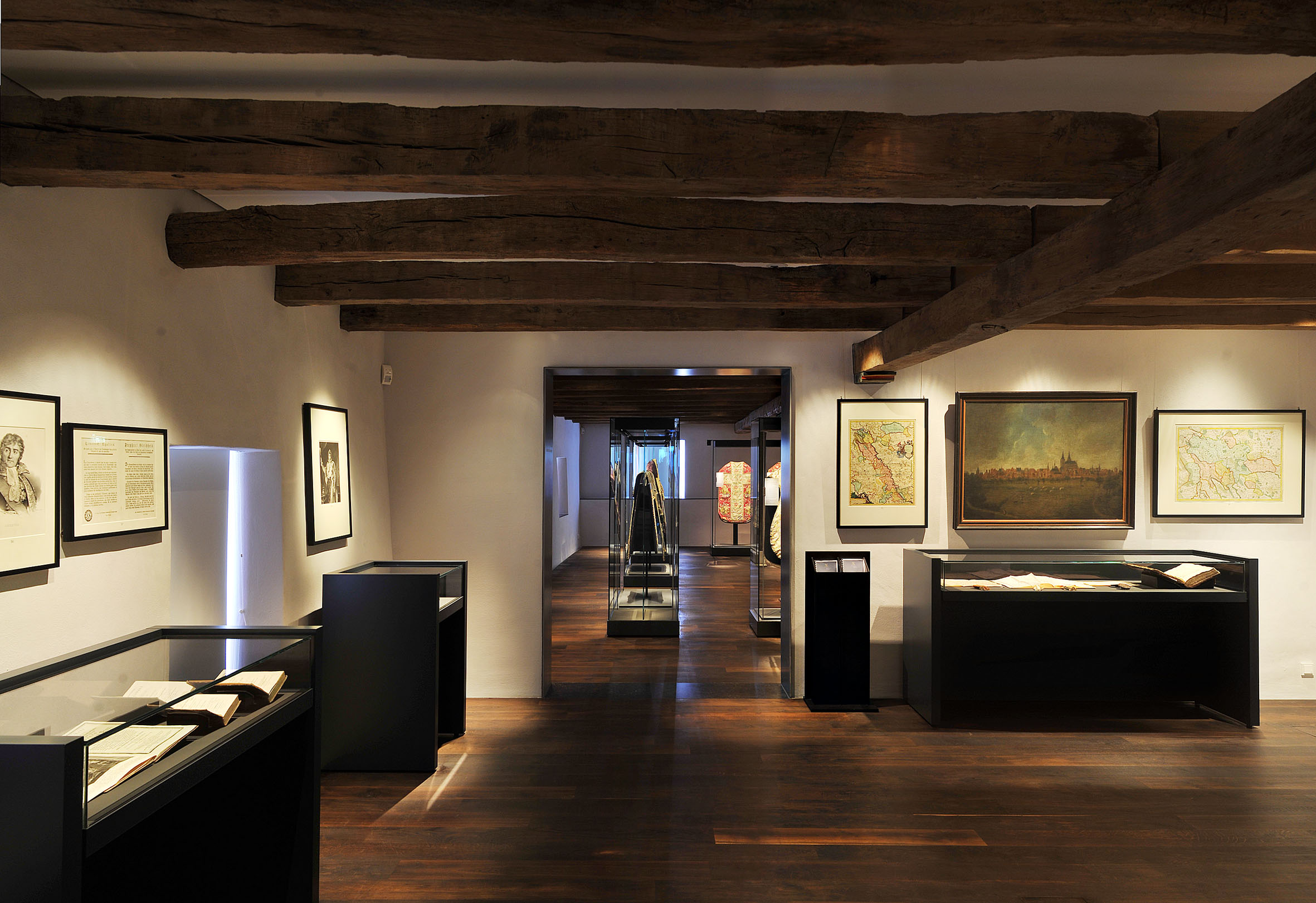 StiftsMuseum Xanten, Raum 9